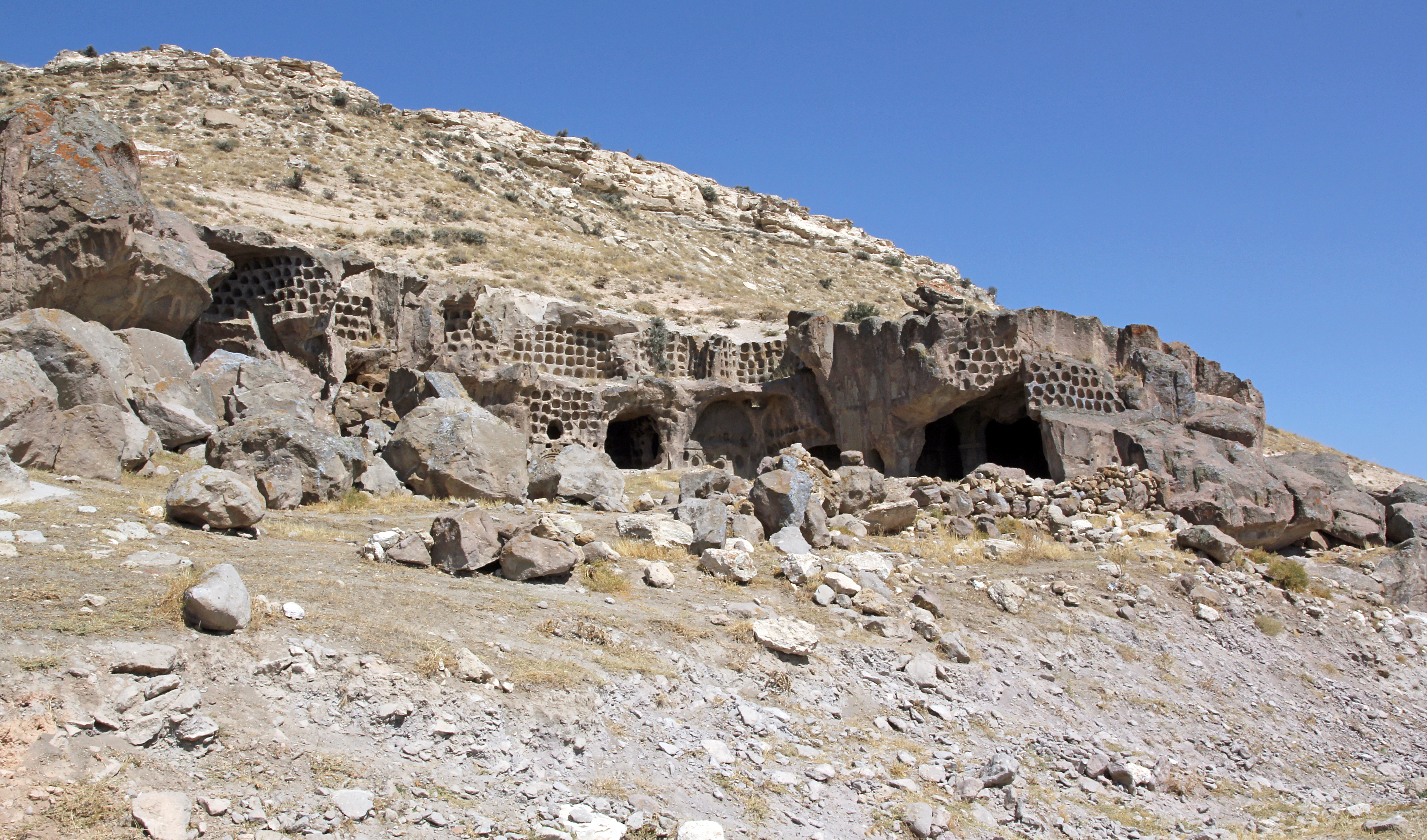 Höhlensiedlung bei der Çanlı Kilise, Aksaray, Kappadokien, Türkei